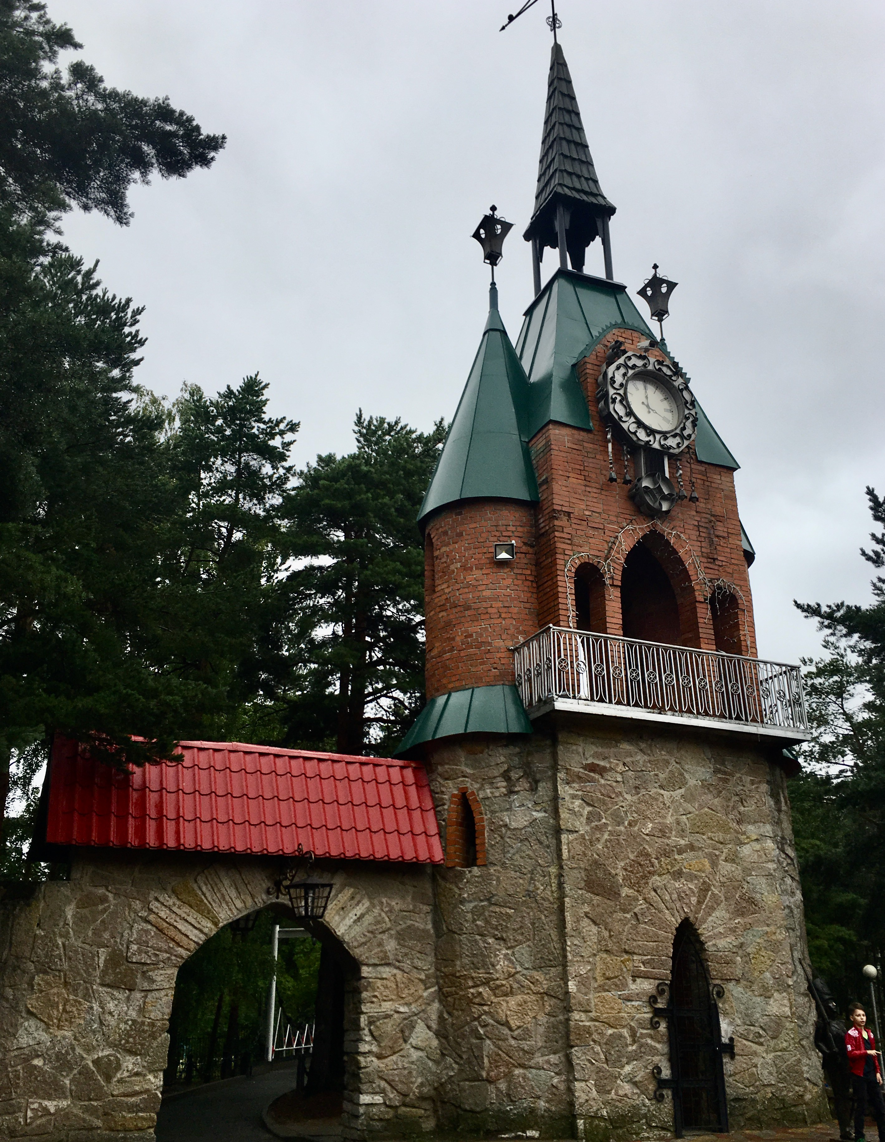 Андерсенград